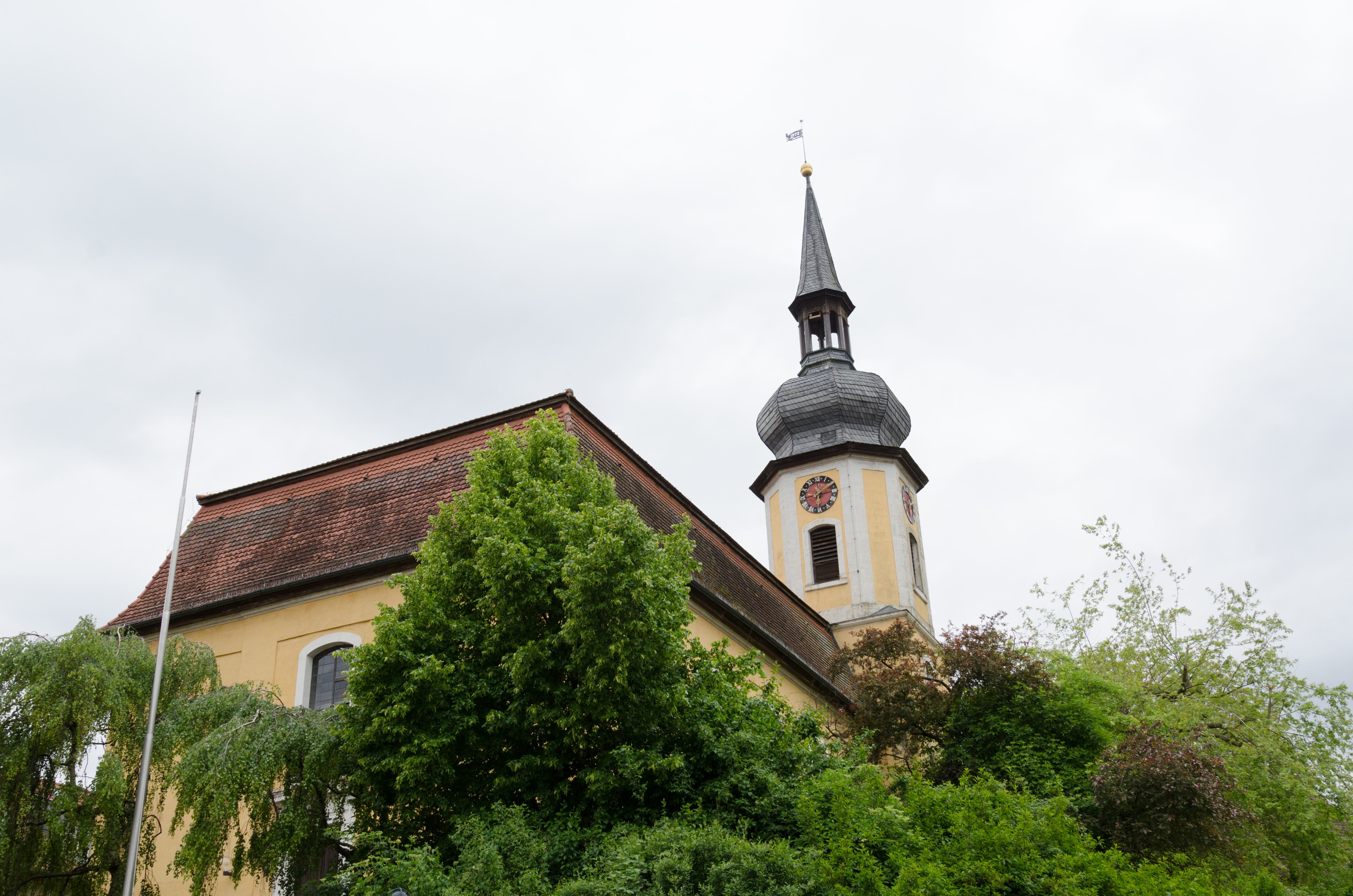 Obernbreit, St. Burkard Kirche